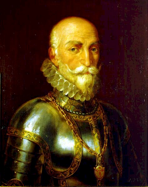 Retrato del aristócrata y marino español Álvaro de Bazán (1526–1588).